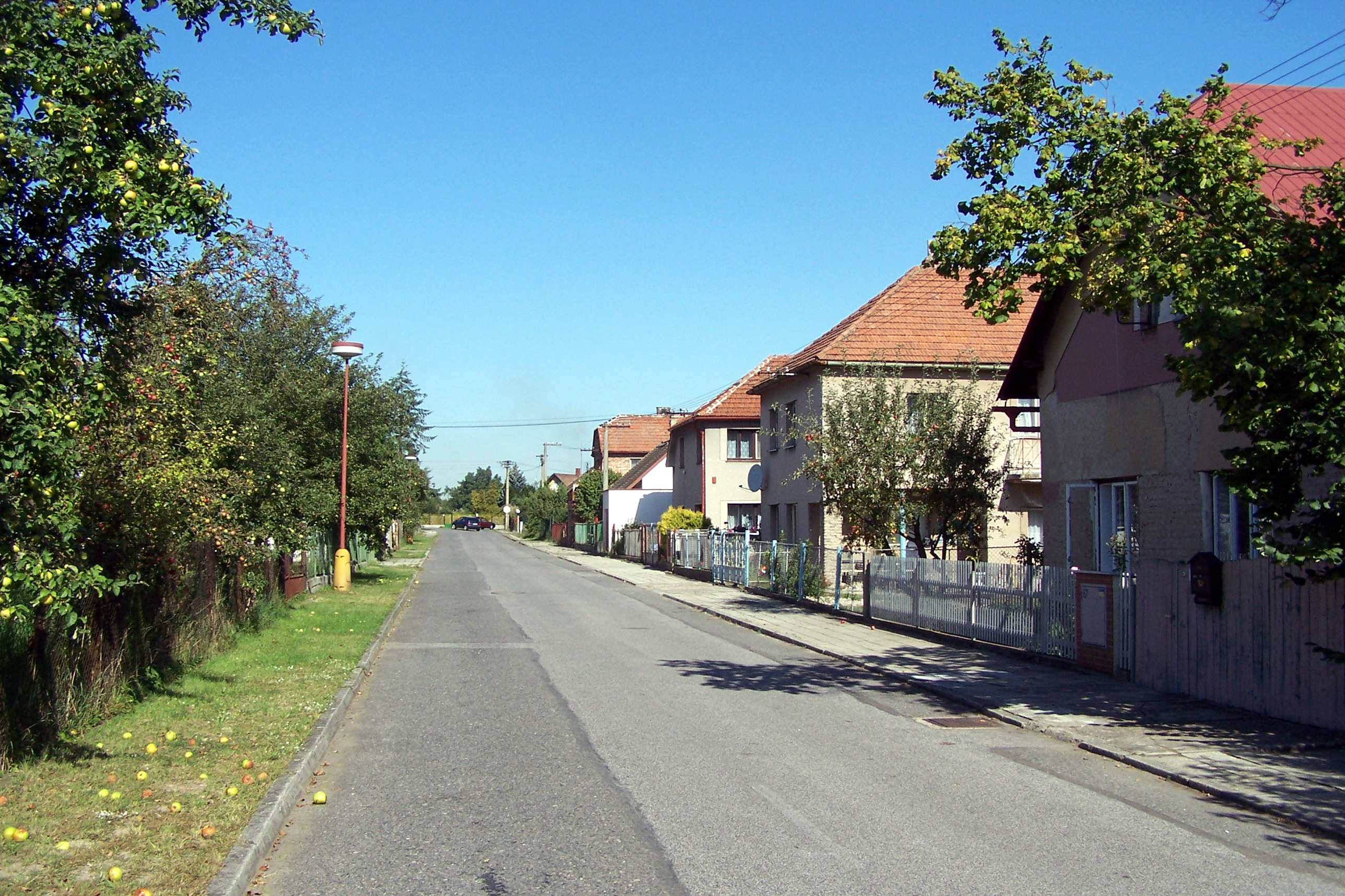 Valy nad Labem - Lepějovická ulice